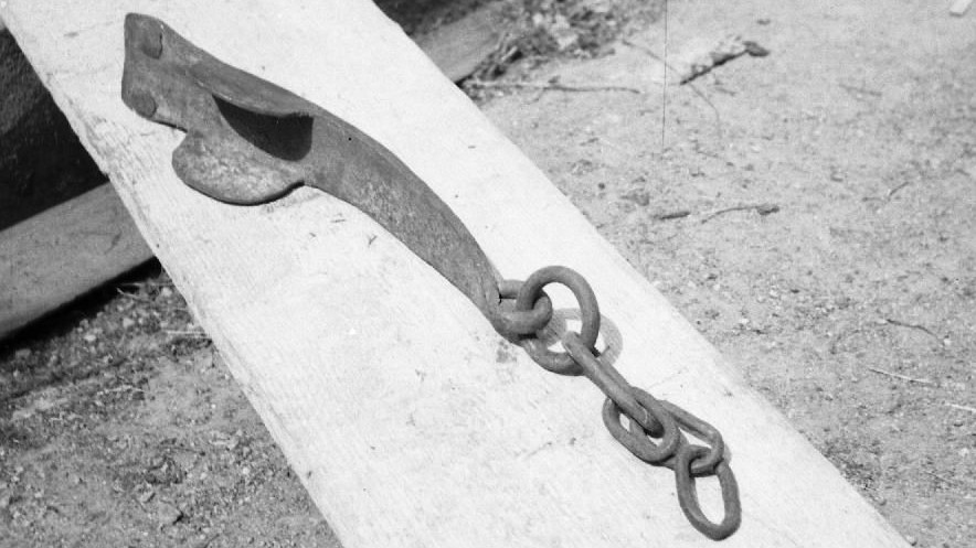 "Cokla" zadržuje furmanski voz po klancu navzdol, Podgora.